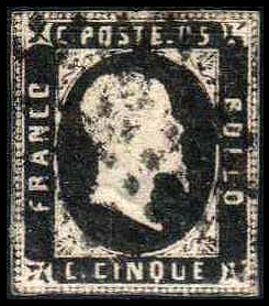 Первая почтовая марка Сардинского королевства